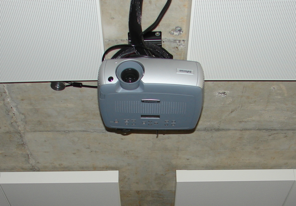 Beamer an der Kantonsschule Baden